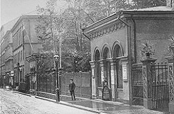 Skandinavisk-Etnografiska samlingen i Davidsons paviljonger på Drottningatan 71. Föregångare till Nordiska Museet och Skansen